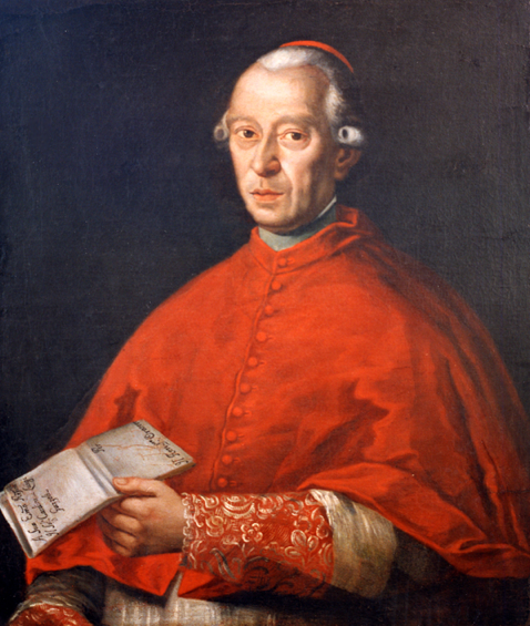 Cardinale Luigi Gazzoli (1735-1809)